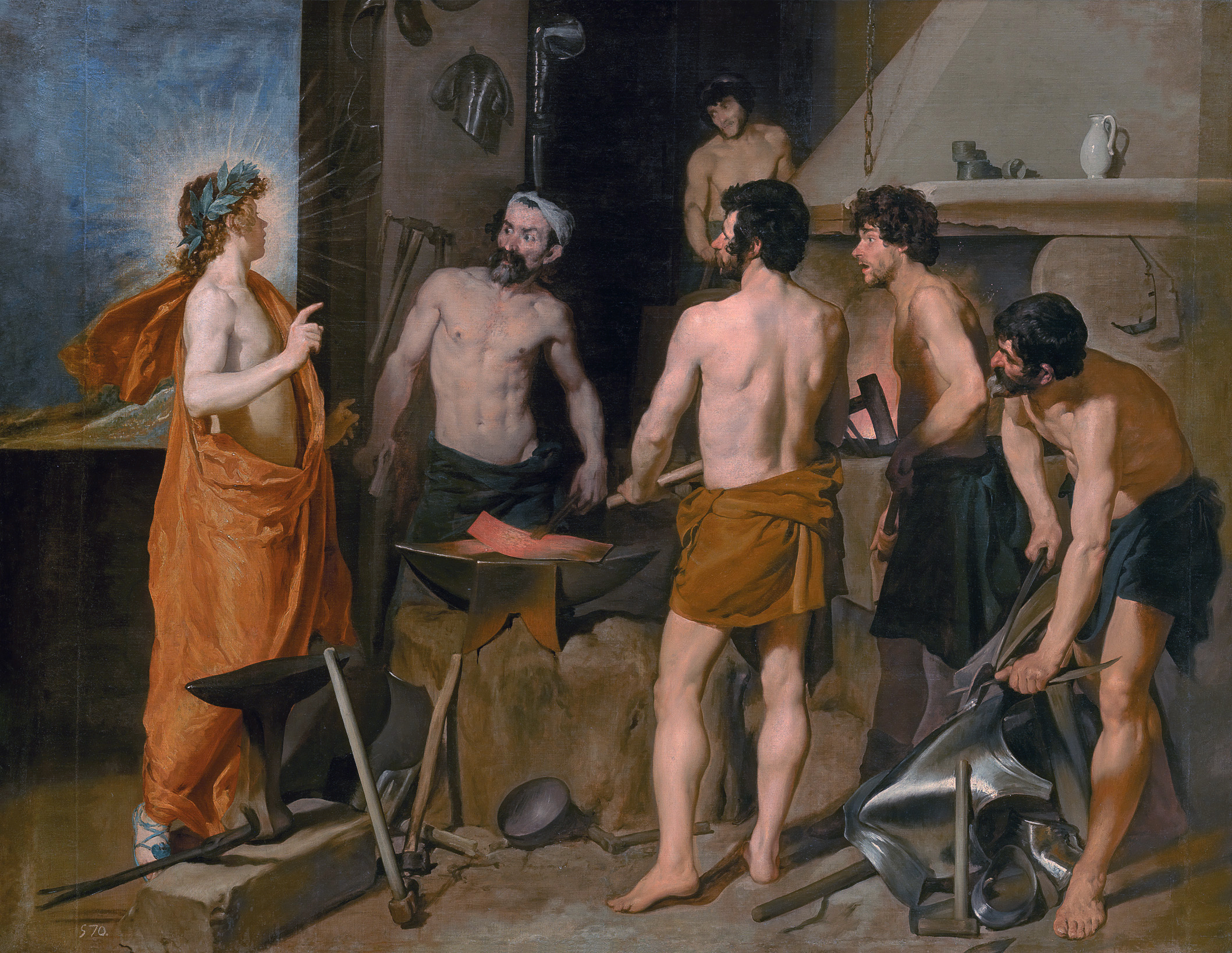 La obra representa al dios Vulcano en su fragua y recibiendo la visita del dios Apolo, que fue a comunicarle que Venus, la esposa de Vulcano, tenía una relación amorosa con Marte.